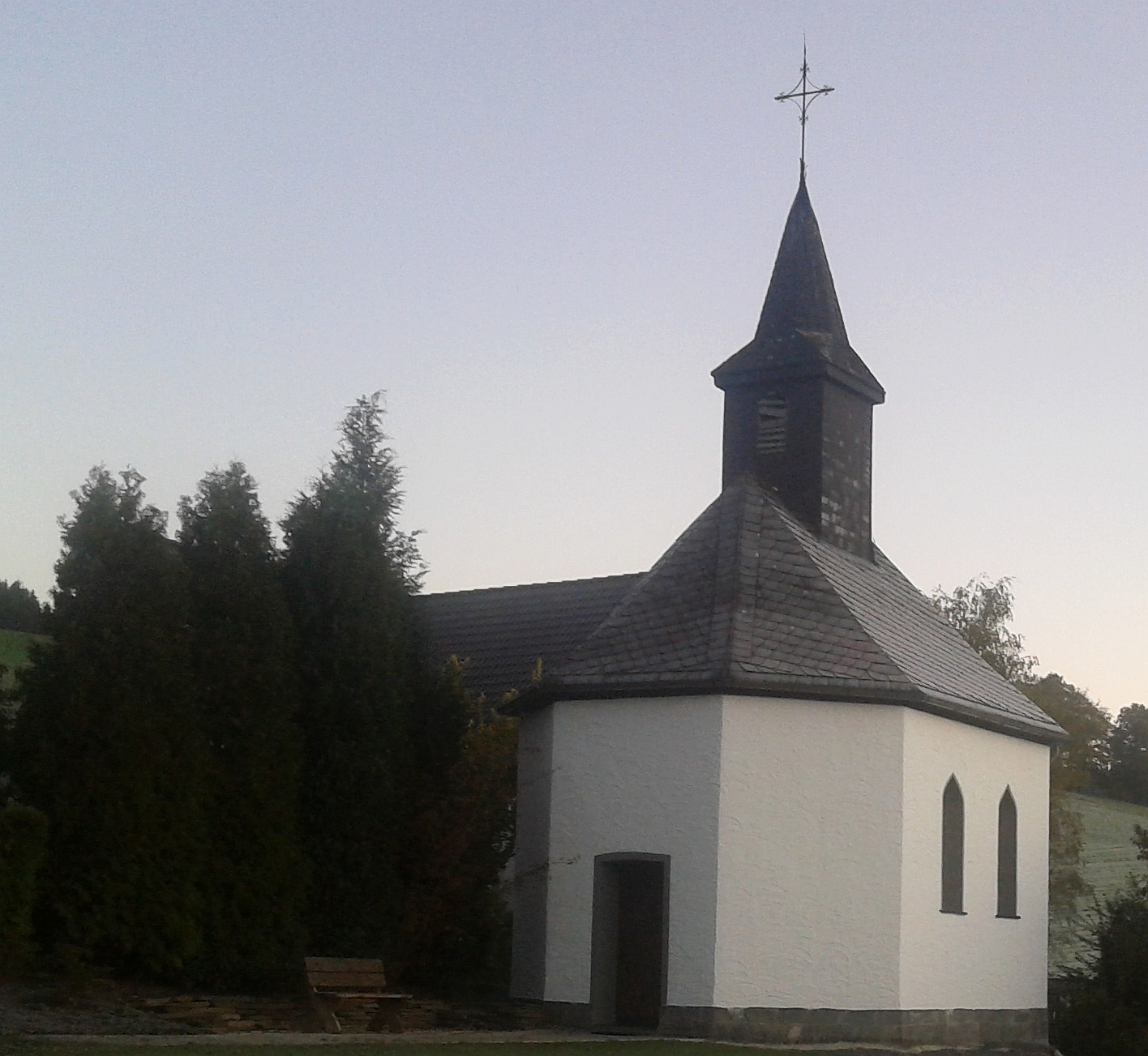 St. Barbara Kapelle, Anno 1884, in Landenbeck (Eslohe), Germany